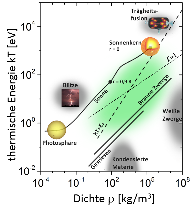 Dichte-Temperatur-Phasendiagramm mit dargestellter Lage der warmen dichten Materie (WDM)